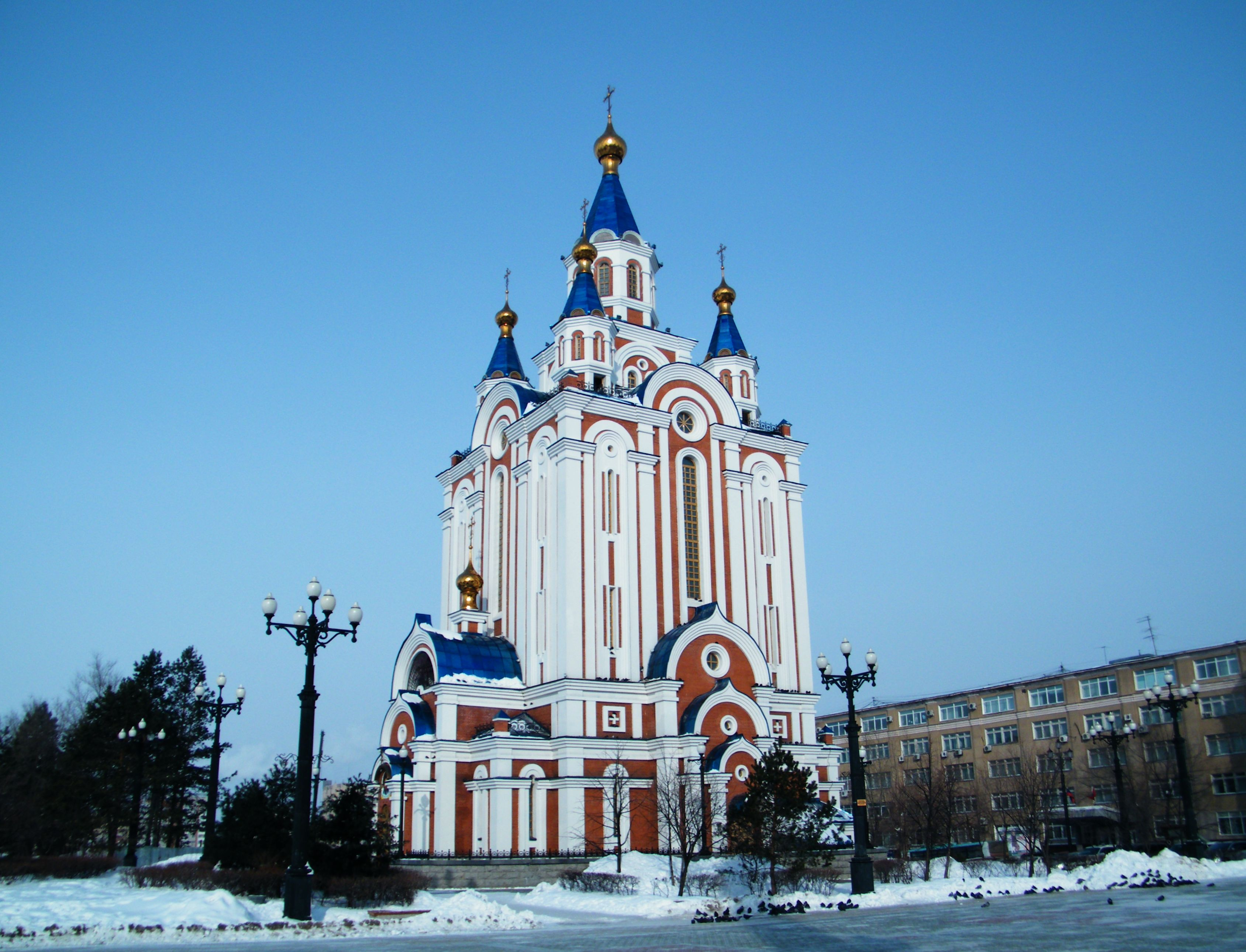 Успенский собор (Хабаровск) 2015